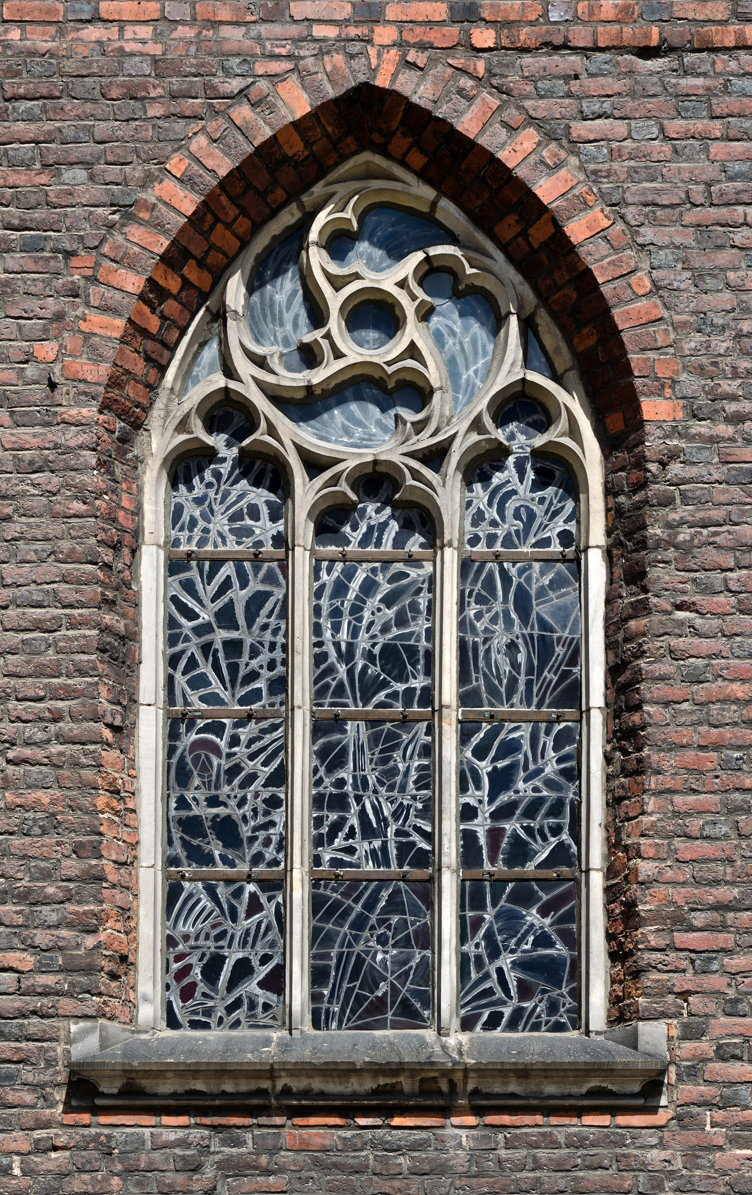 Nysa, kościół par. p.w. św. Jakuba Starszego i św. Agnieszki, 1430, XIX, po 1945